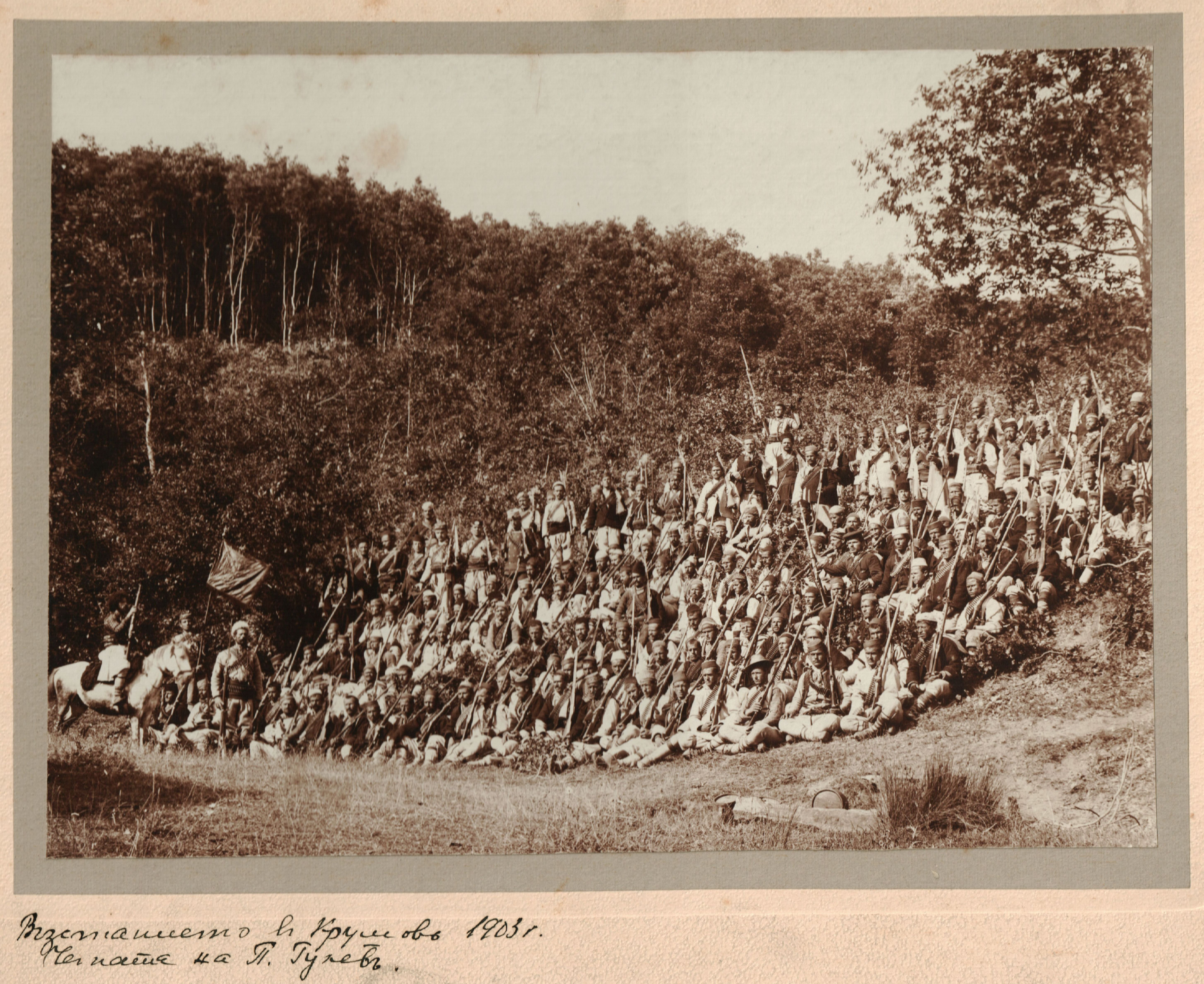 Снимка на четата на Пито Гулев